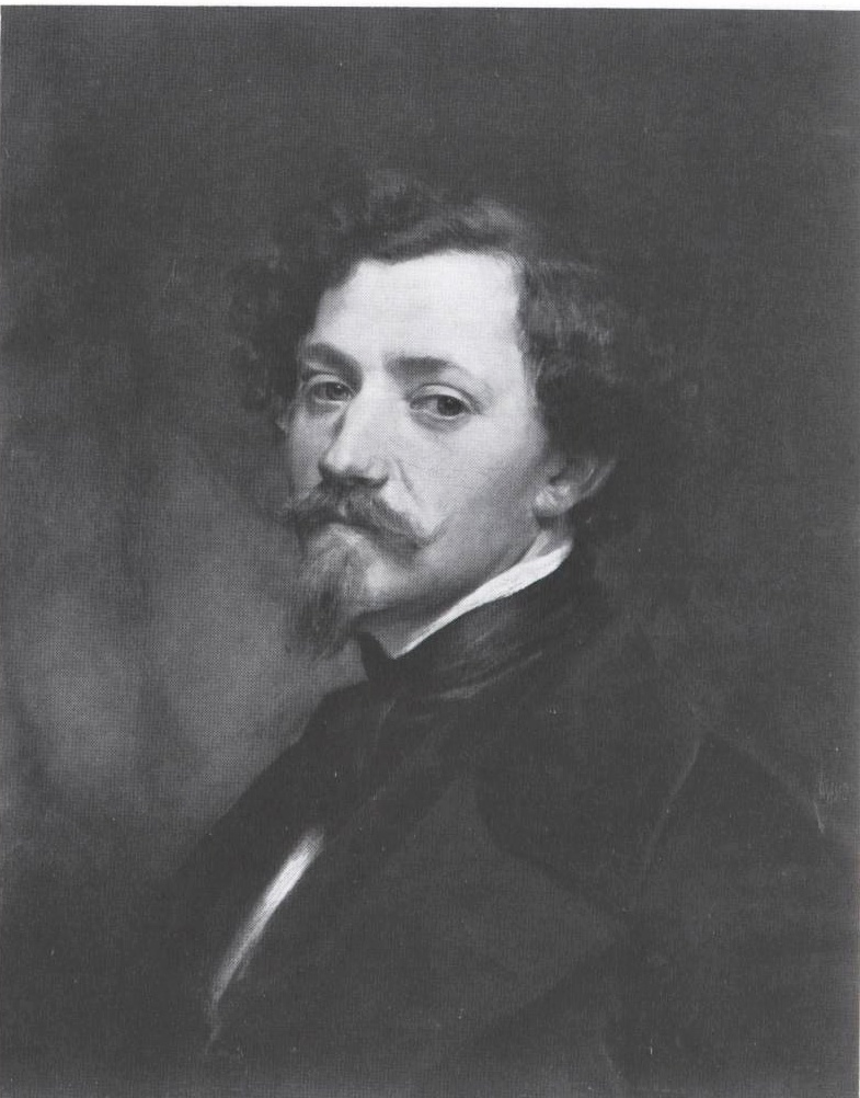 Der Mannheimer Maler Louis Coblitz (1814-1863)